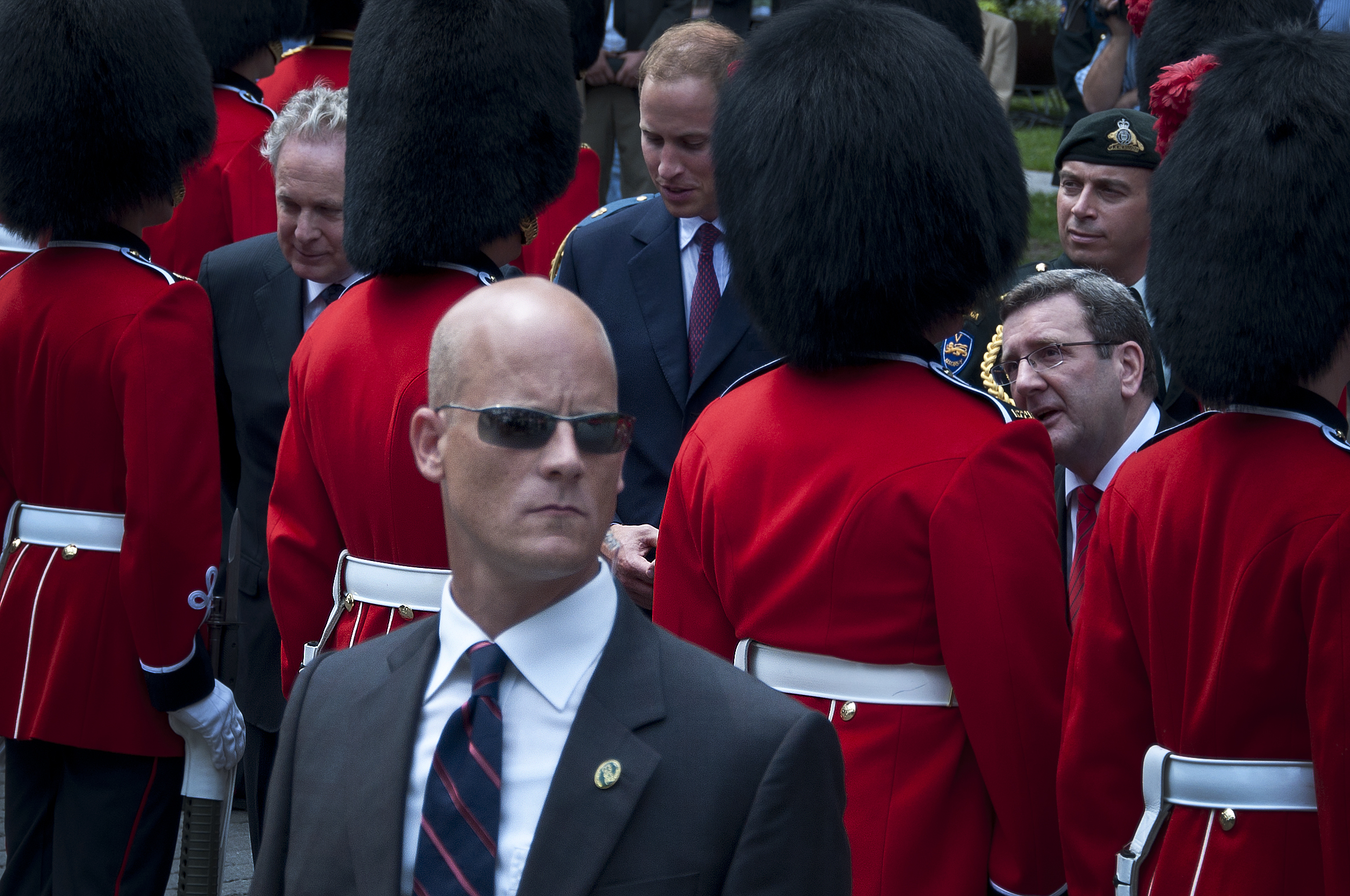 Prince William Gendarmerie royale du Canada Royal 22e Régiment Jean CharestRégis Labeaume